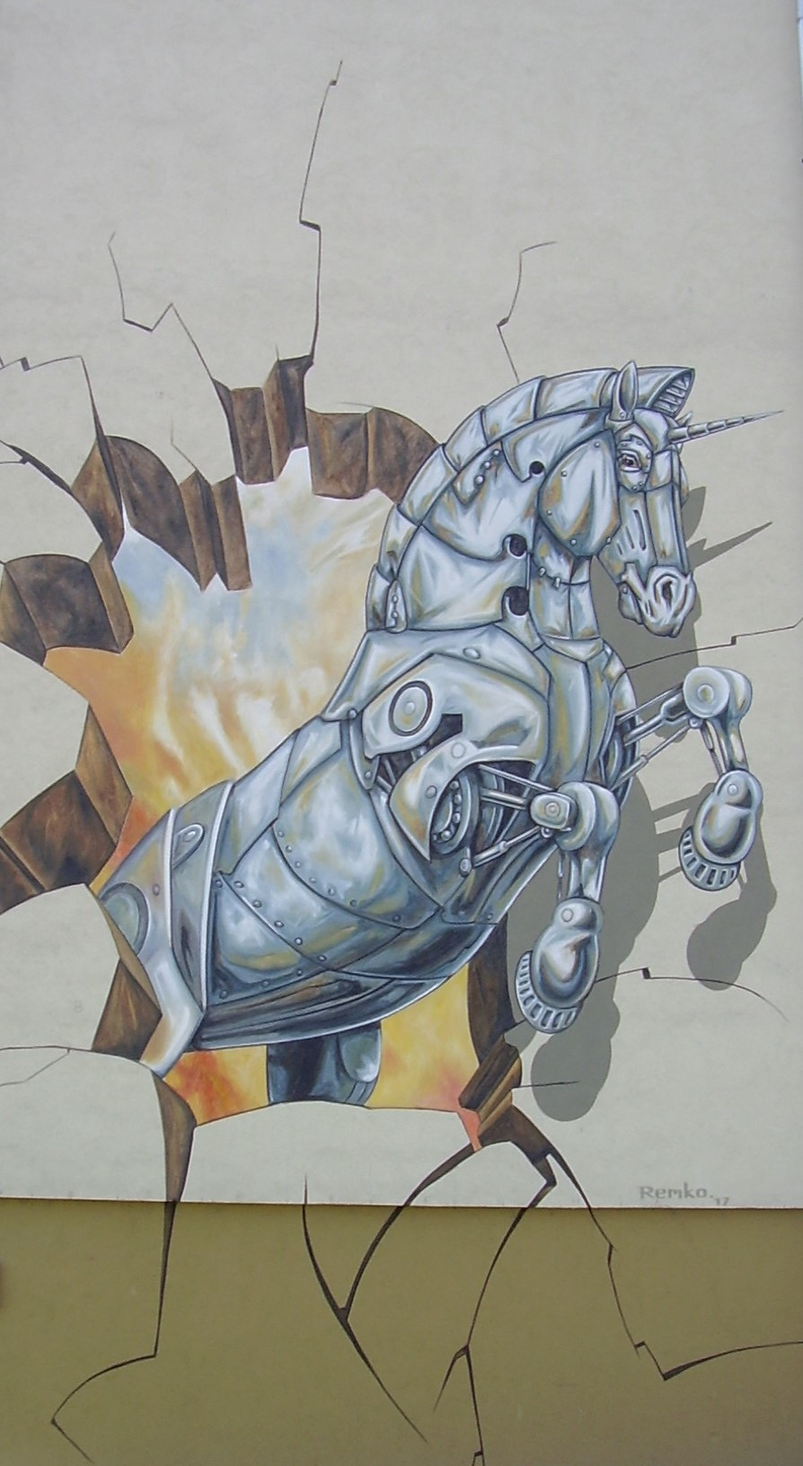 Kazincbarcika, Fő tér 19. - Remko Van Schaik: Robot unikornis falfestmény (Felállítás: 2017. augusztus 10), a művész első magyarországi műve.